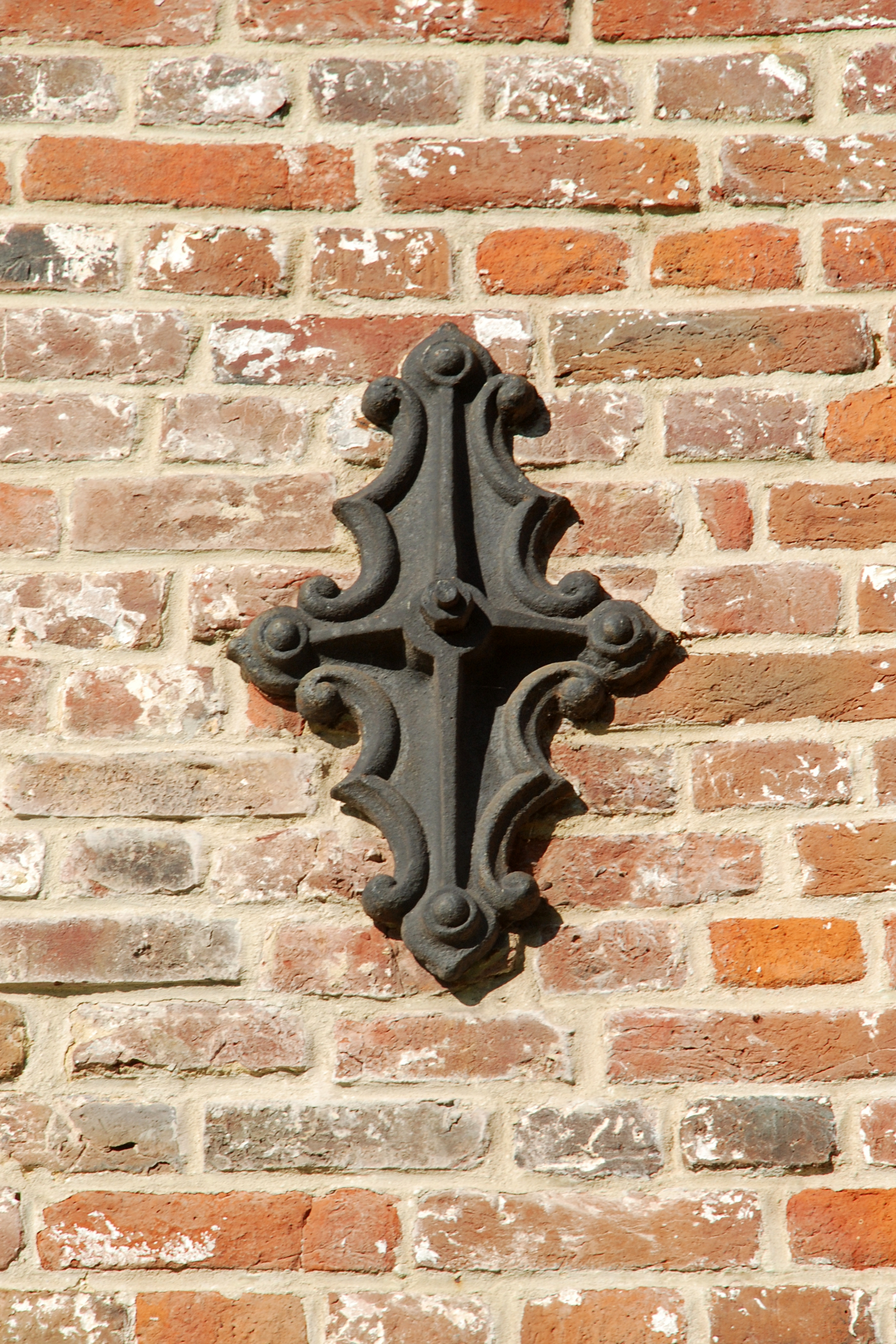 Belgique - Wallonie - Ottignies - Ferme du Douaire